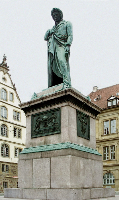 Stuttgart Schillerplatz Schiller von Bertel Thorvaldsen 1839 Selbst fotografiert von user:Enslin